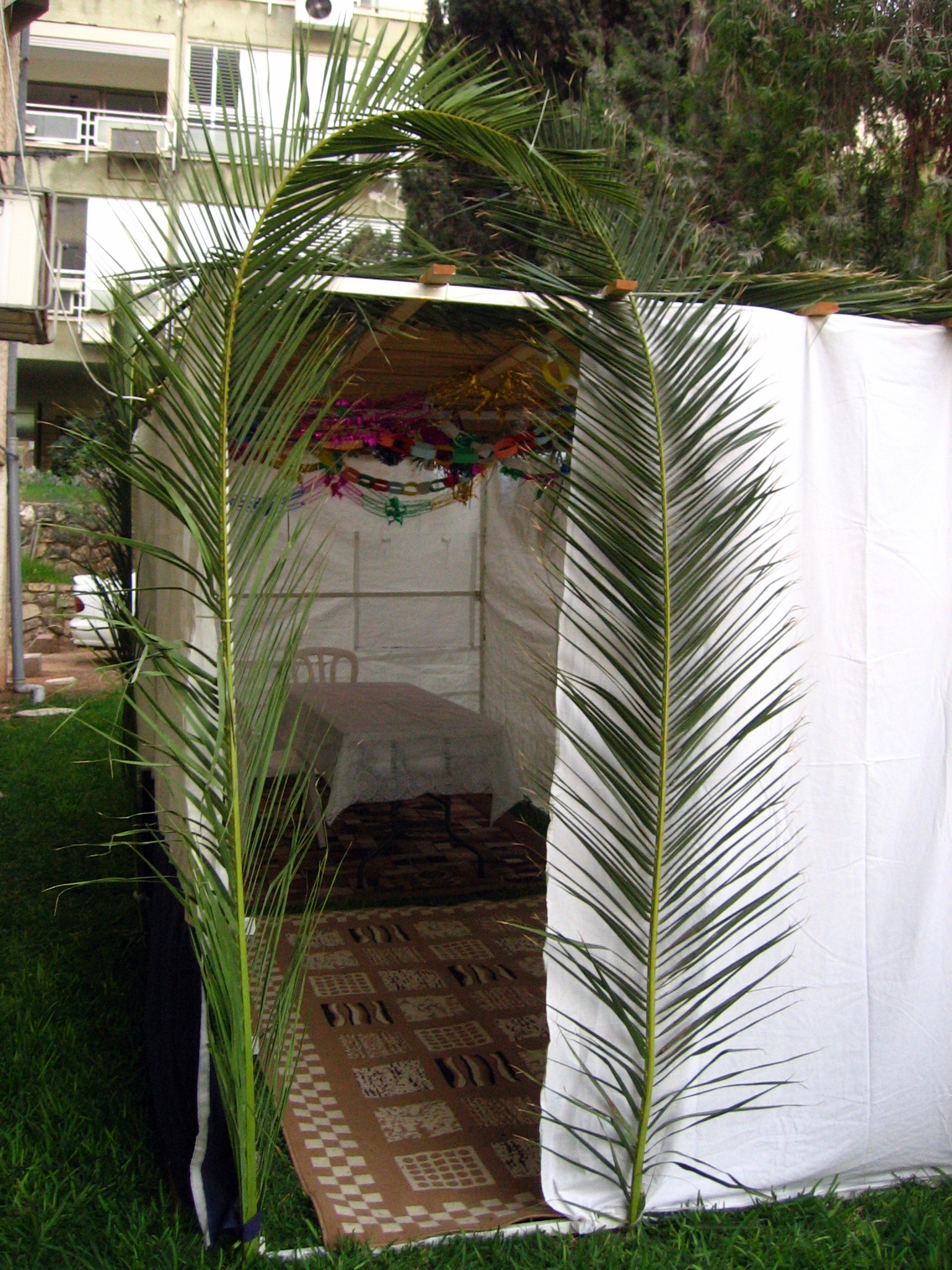 Sukkah